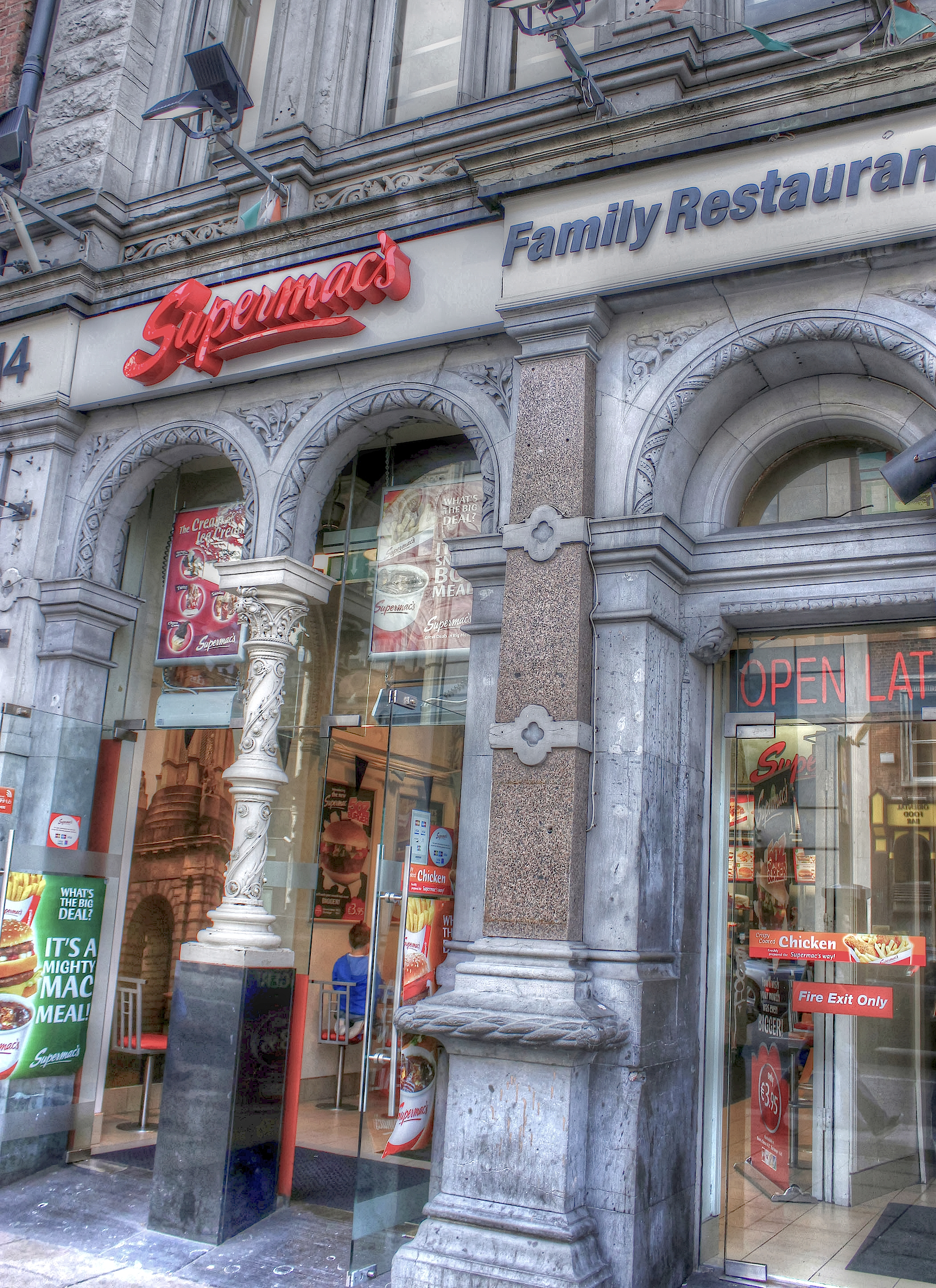 supermacs